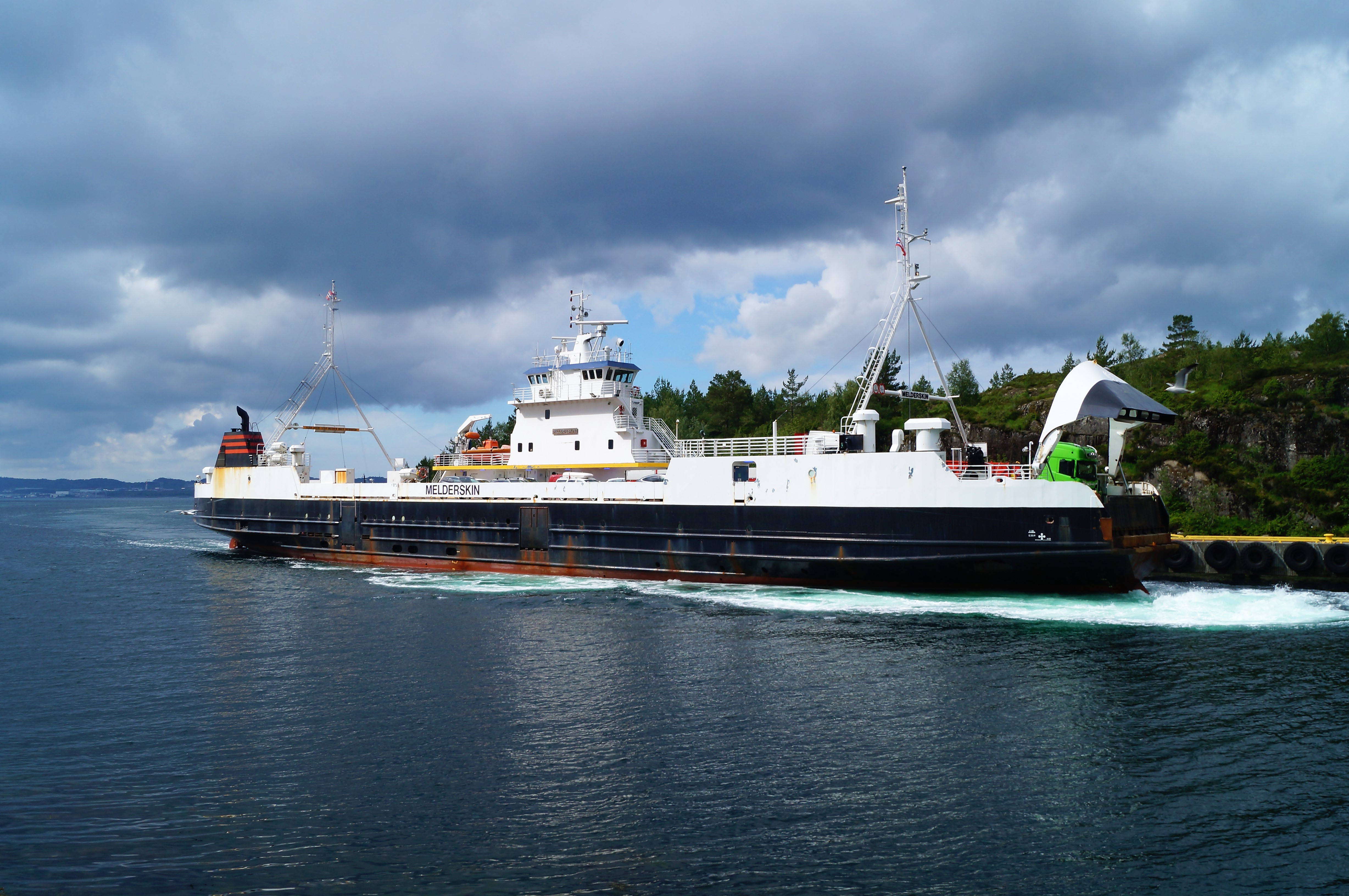 «Melderskin» i Sløvåg